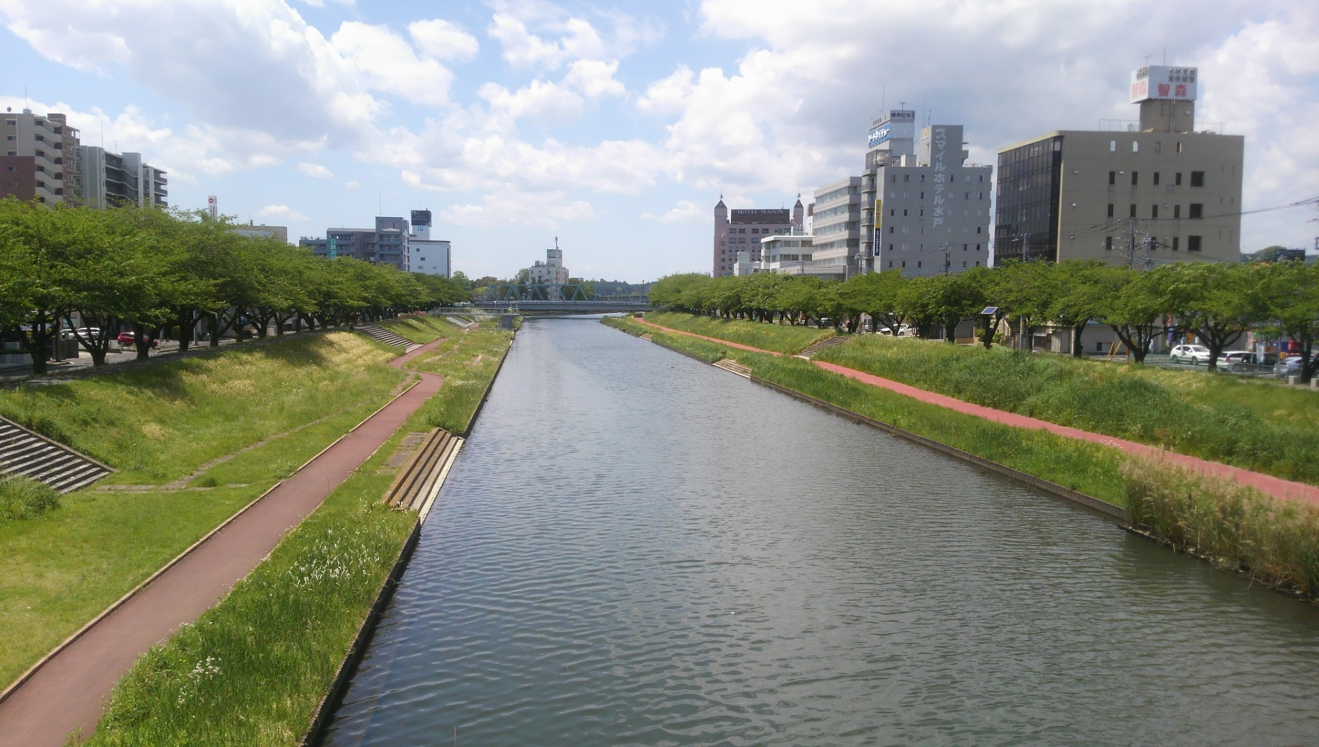 桜川。茨城県水戸市。JR東日本水戸駅南口駅前通り橋梁より上流方向。